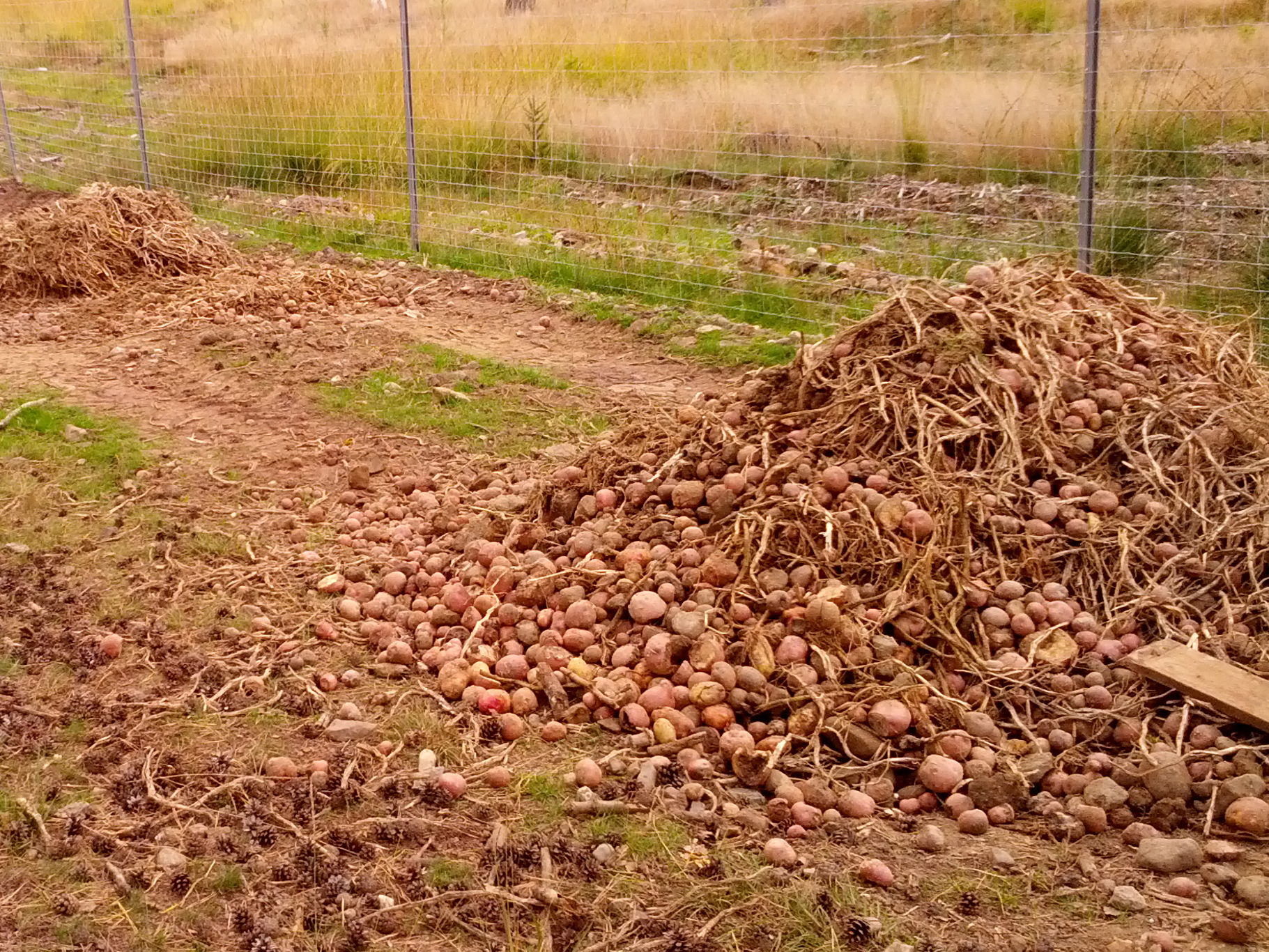 Wildfütterung in der Üfter Mark, Naturpark Hohe Mark-Westmünsterland, Nordrhein-Westfalen